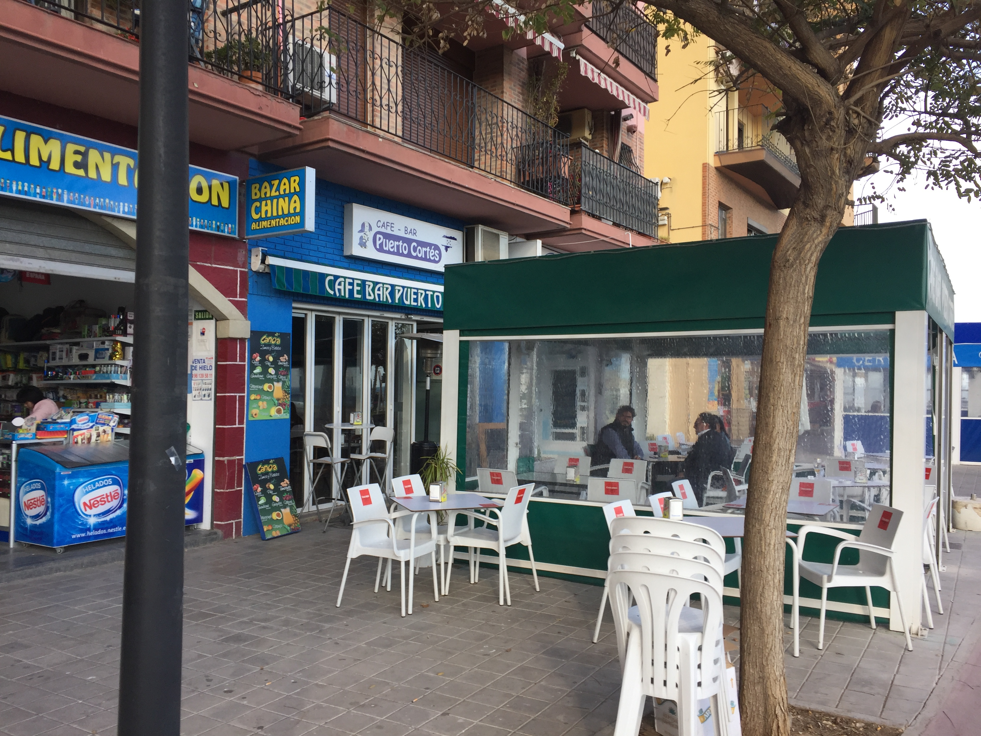 Bar Puerto Cortés, en España.